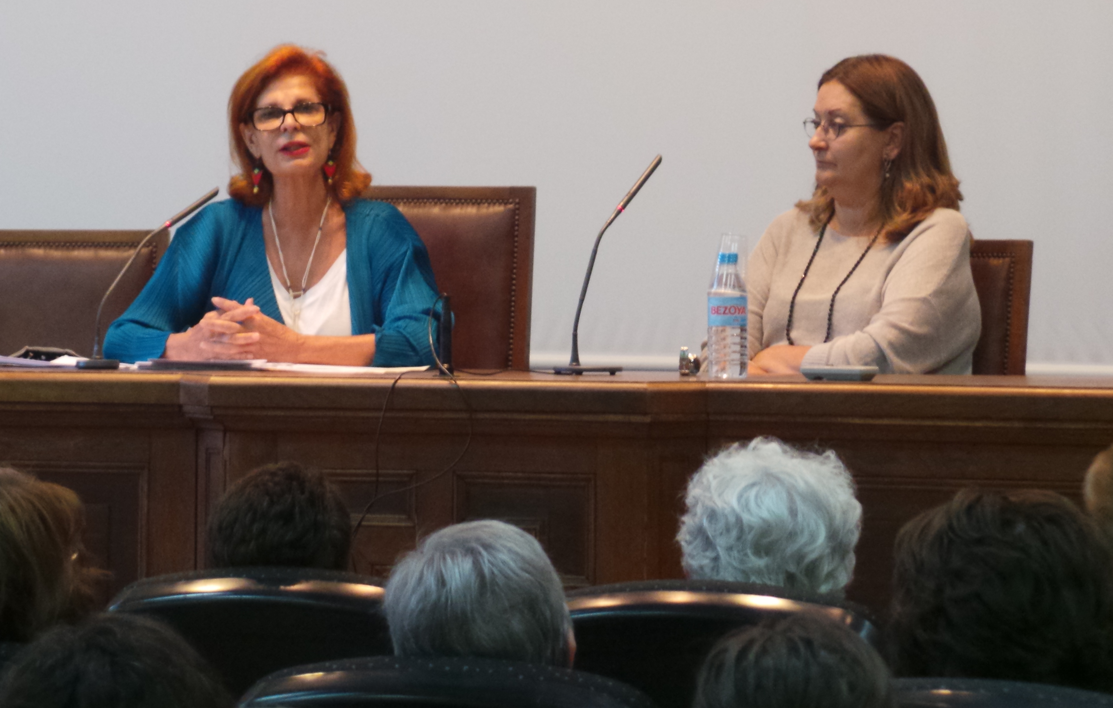 Intervención en la Universidad de Verano de Estudios de Género. UIB. Palma de Mallorca Septiembre 2015